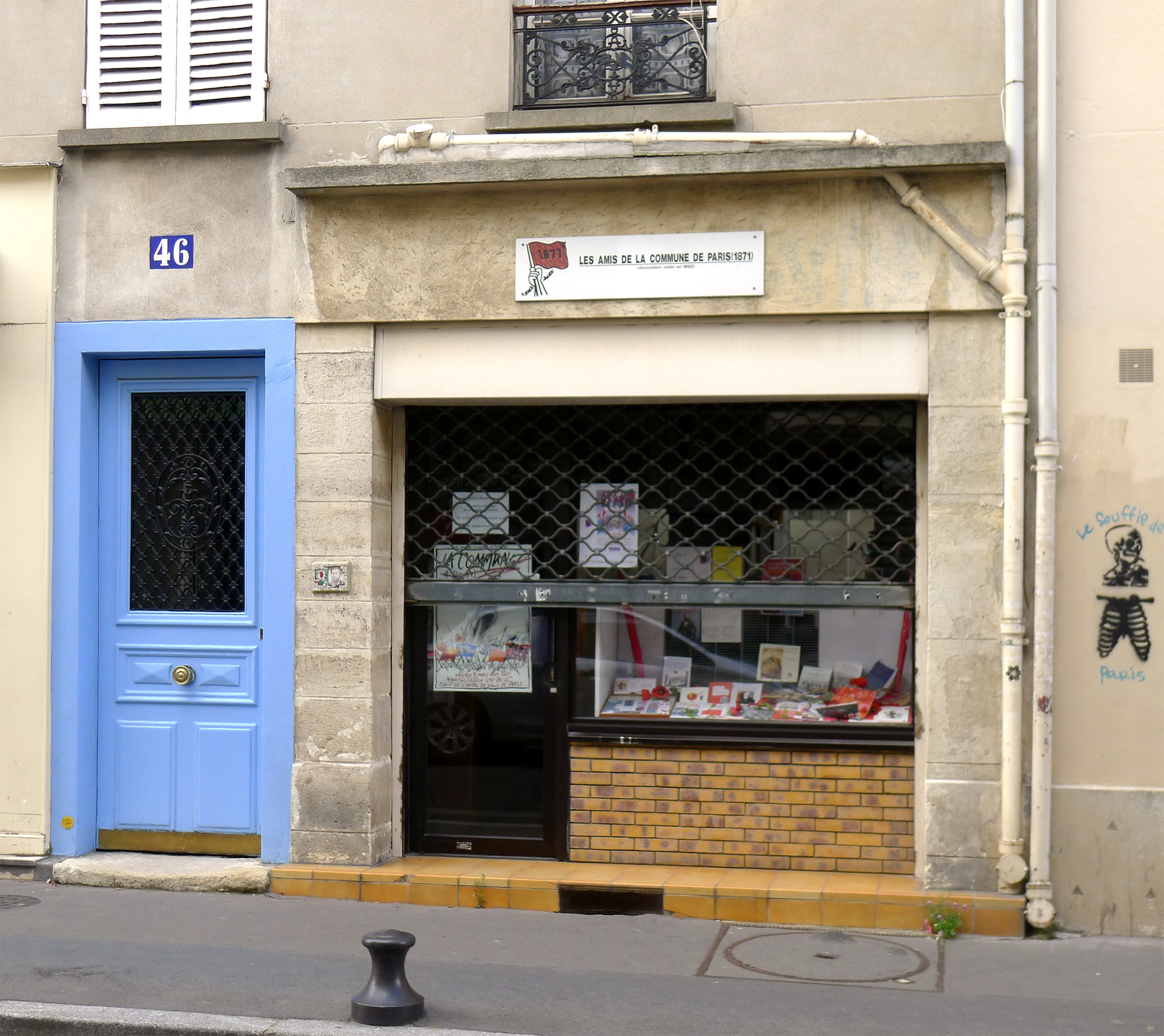 Rue des Cinq-Diamants (n° 46) - Paris XIII